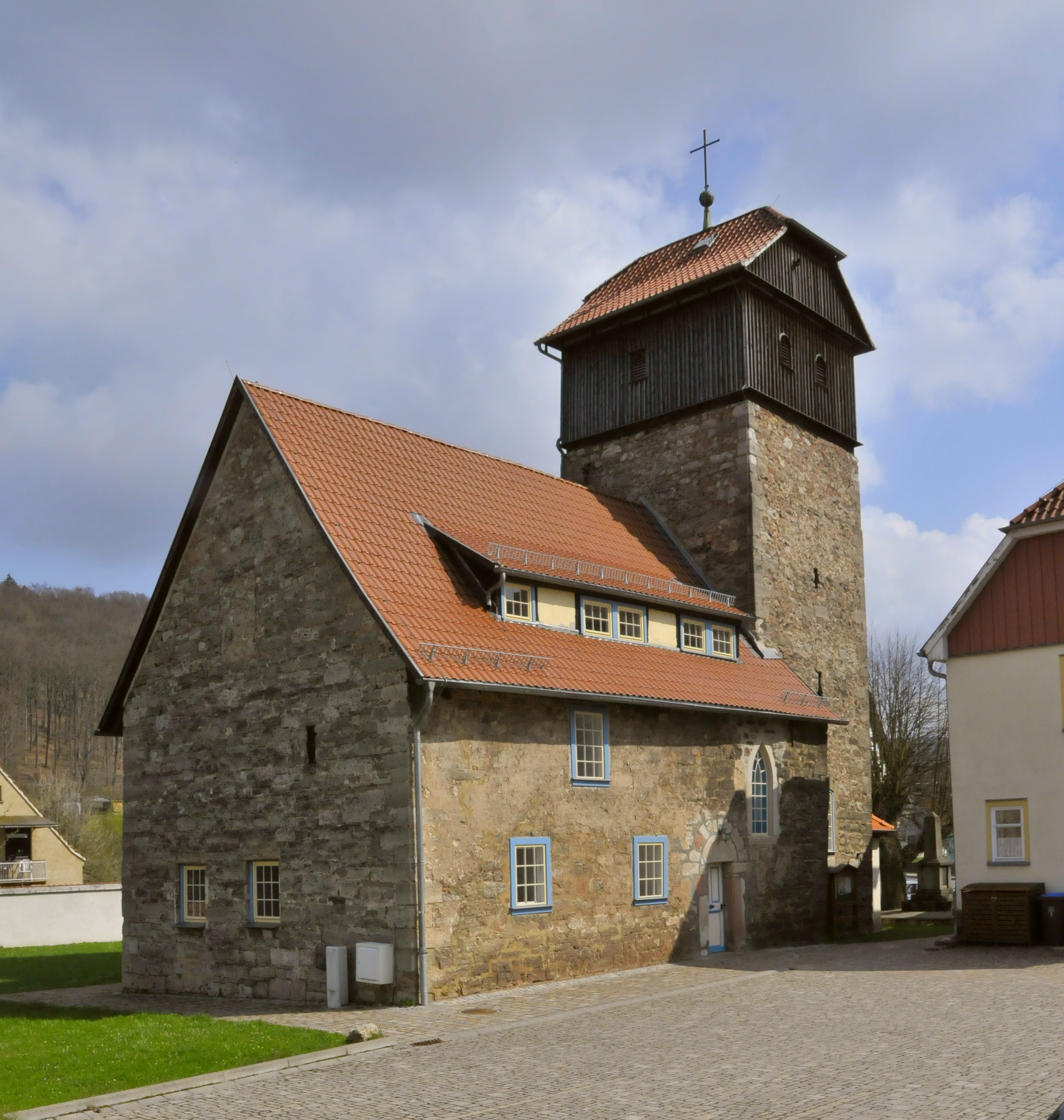 Förtha, Kirche